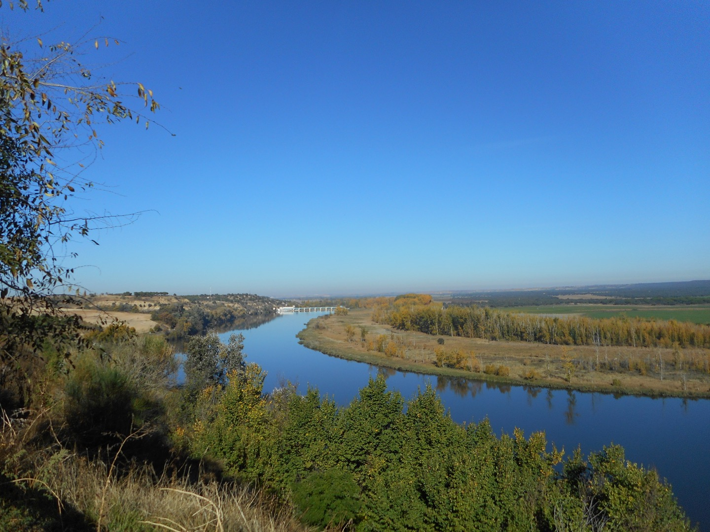 Ribera del Duero en Castronuño desde el mirador de la Muela This is a photography of a Site of Community Importance in Spain with the ID: ES4180017. Natura2000 entry, EEA entry